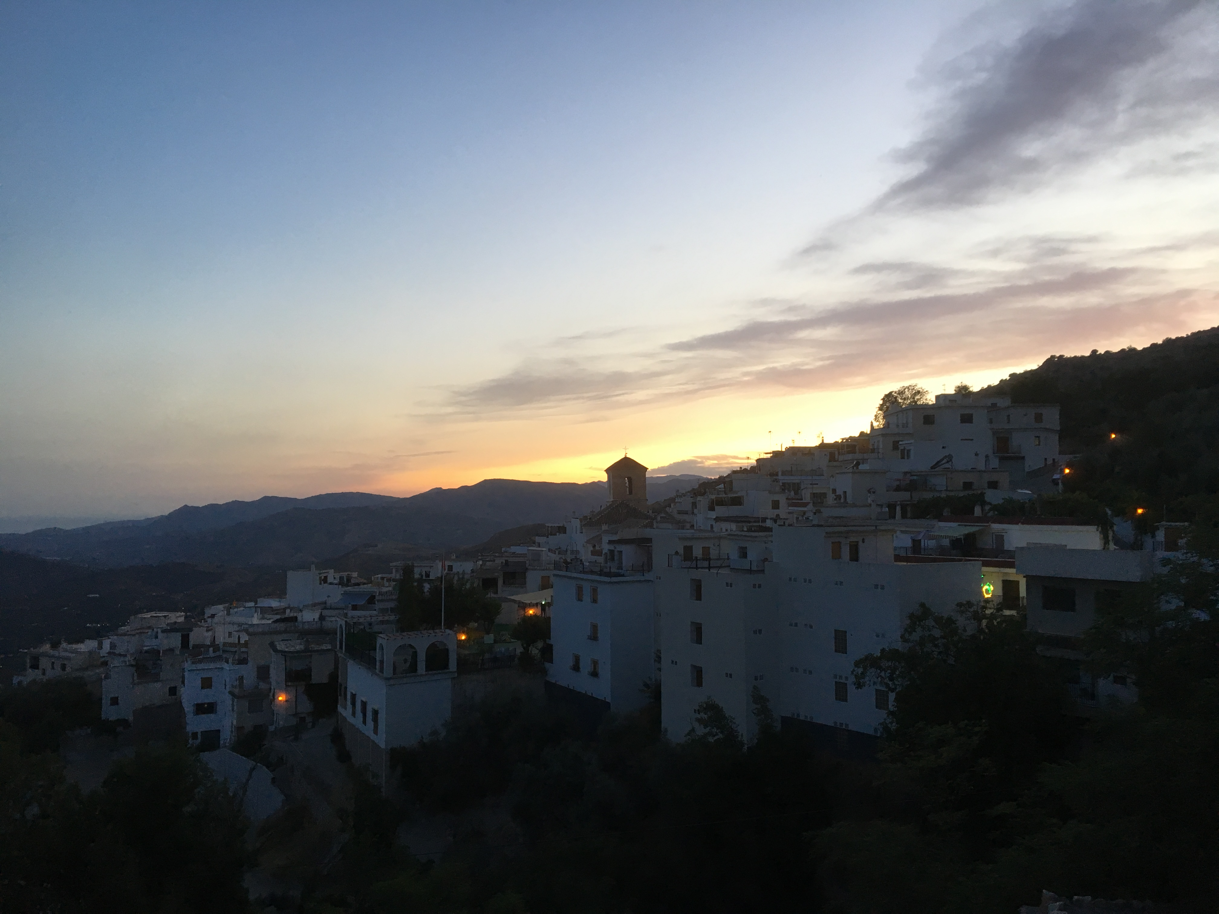 Atardecer en Soportújar